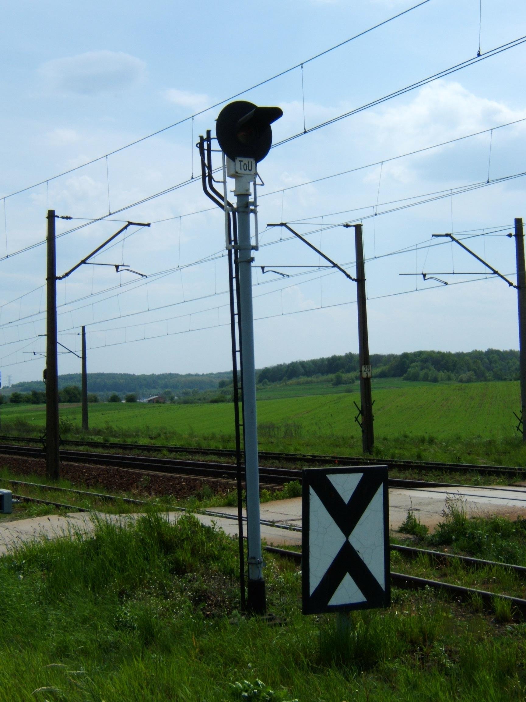 Tarcza ostrzegawcza ze wskaźnikiem W1 przy przejeździe kolejowym w Nakle Śląskim